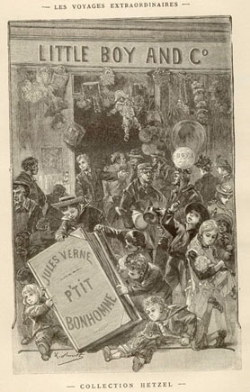 Původní ilustrace Léona Benetta. k Vernově knize